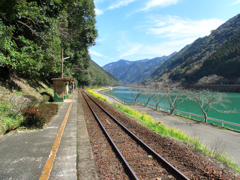 JR肥薩線海路駅 ホーム 写真奥が八代駅方面。右側が球磨川。 撮影者/著者/著作権保有者 : MK Products (本人がアップロード) 撮影日 : 2007/03/01 海路駅用にアップロードした画像です。良い画像があれば別の画像に変えてください。